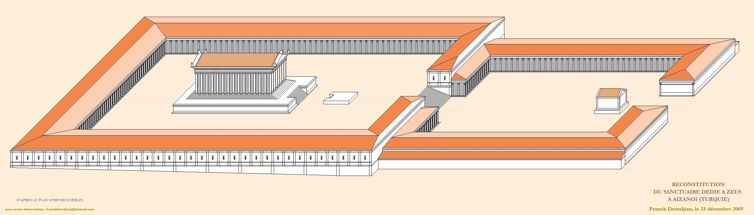 Description Restauration du sanctuaire dédié à Zeus à Aizanoi, sous le règne de l'empereur HadrienDate 23 December 2009Source Franck DevedjianAuthor Franck Devedjian, né le 12 août 1981 à Clamart (92) Restauration du sanctuaire dédié à Zeus à Aizanoi, sous le règne de l'empereur Hadrien